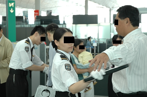 中文（香港）: 機場保安有限公司-搜查旅客(白色上衣)